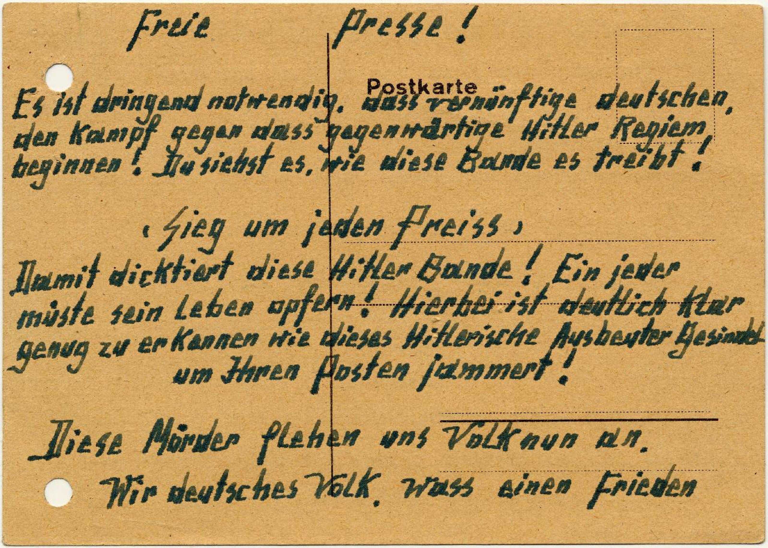 Postkarte gegen das NS-Regime von den Hampels